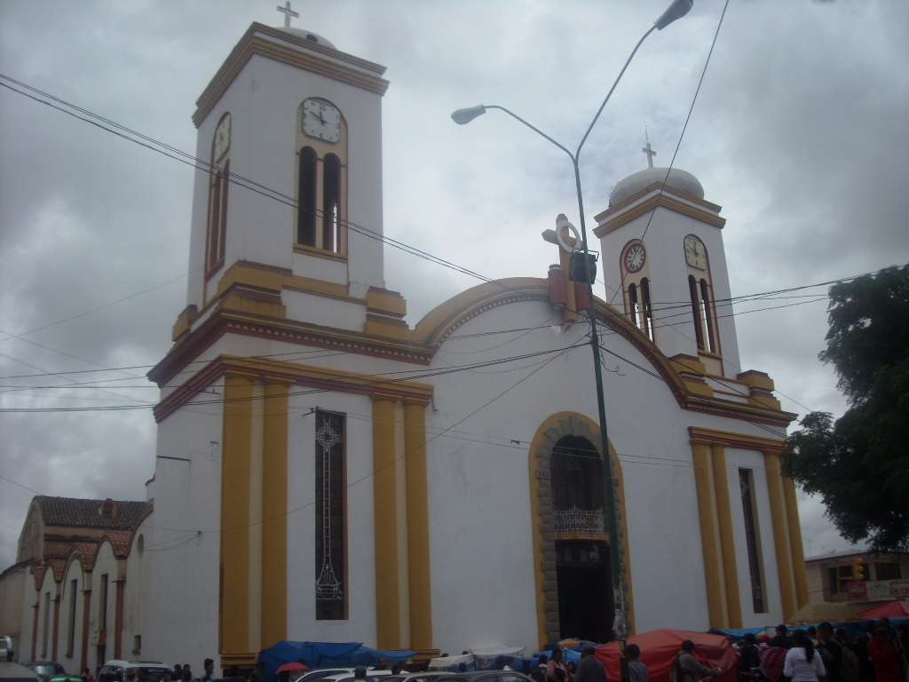 El Templo San Juan Bautista de Punata, es una construcción colonial, alberga retablos de estilo colonial.